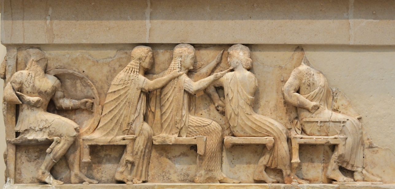 Détail de la frise est du trésor de Siphnos à Delphes, représentant l'assemblée des Dieux.